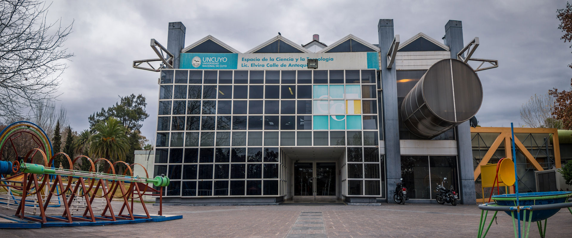 Facultad de Ciencias Exactas y Naturales de la UNCUYO